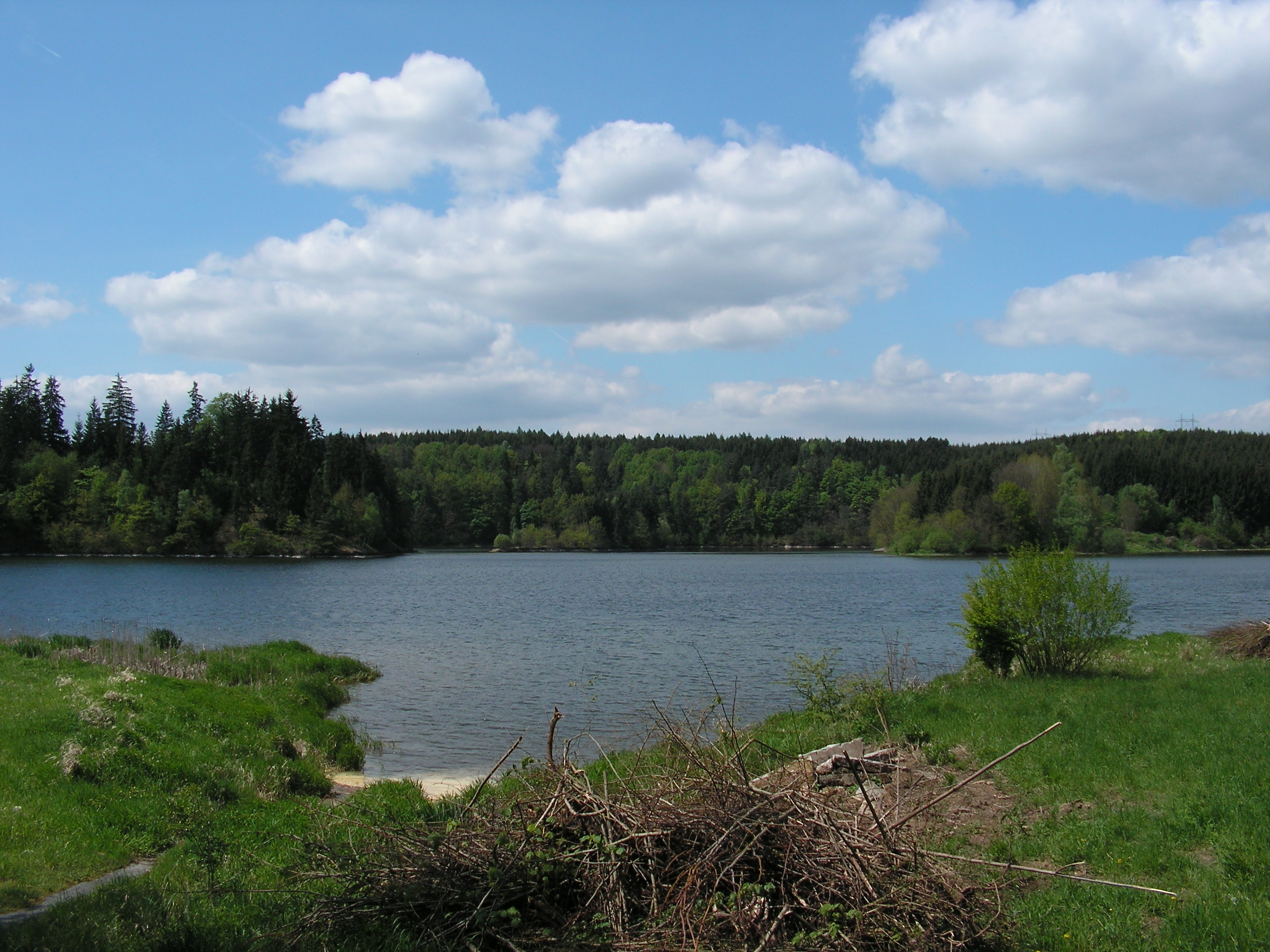 Vodní nádrž Švihov v místě, kde se nacházelo město Zahrádka. V pozadí snímku je vidět ostrůvek a ústí Blažejovického potoka.